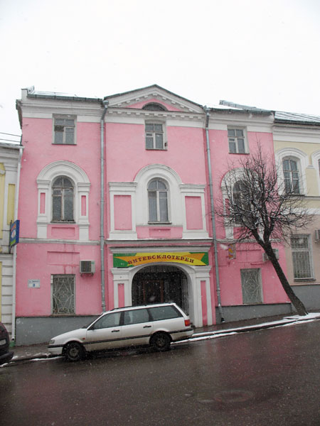 Віцебск. Суворава 8